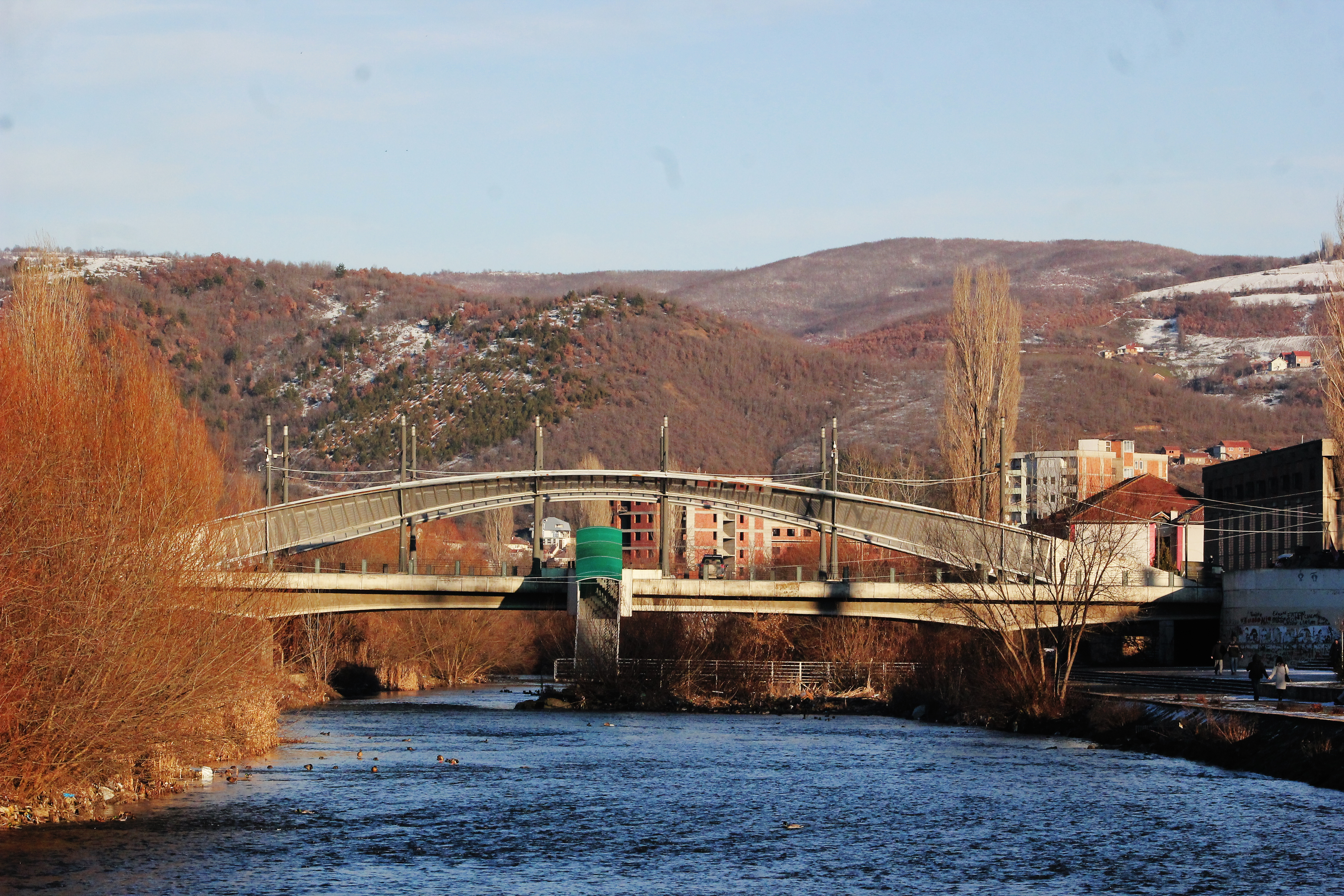 Pamje e Urës kryesore mbi lumin Ibër, e cila ndan pjesën veriore dhe jugore të qytetit.